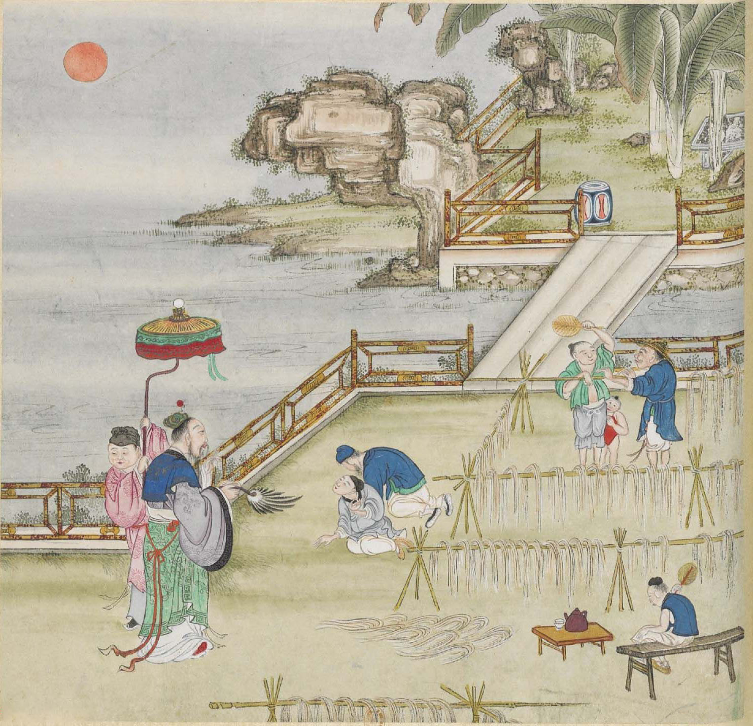 竹紙製造工序：太陽以曝